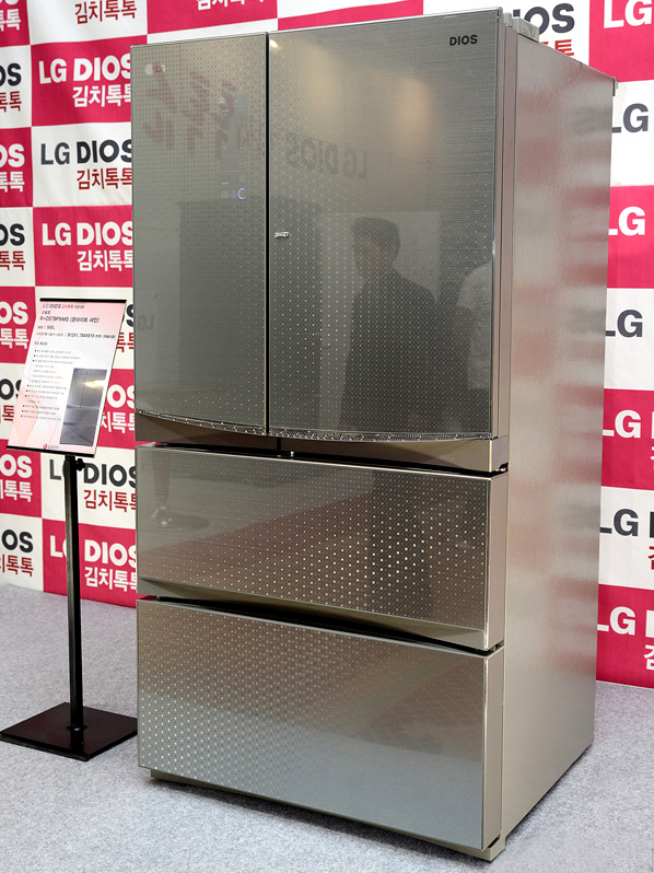 2012년 9월 21일, 서울 플라자 호텔에서 개최된 LG DIOS 김치톡톡쇼